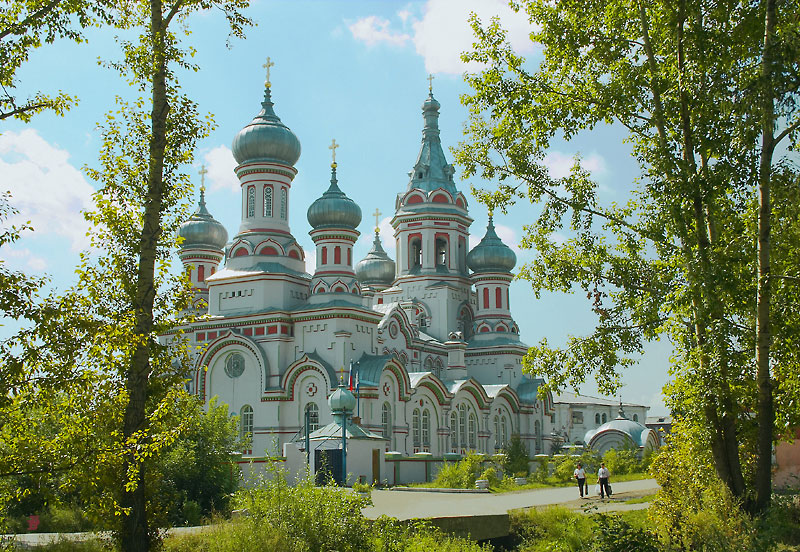 Князе-Владимирскй храм в Иркутске, современный вид